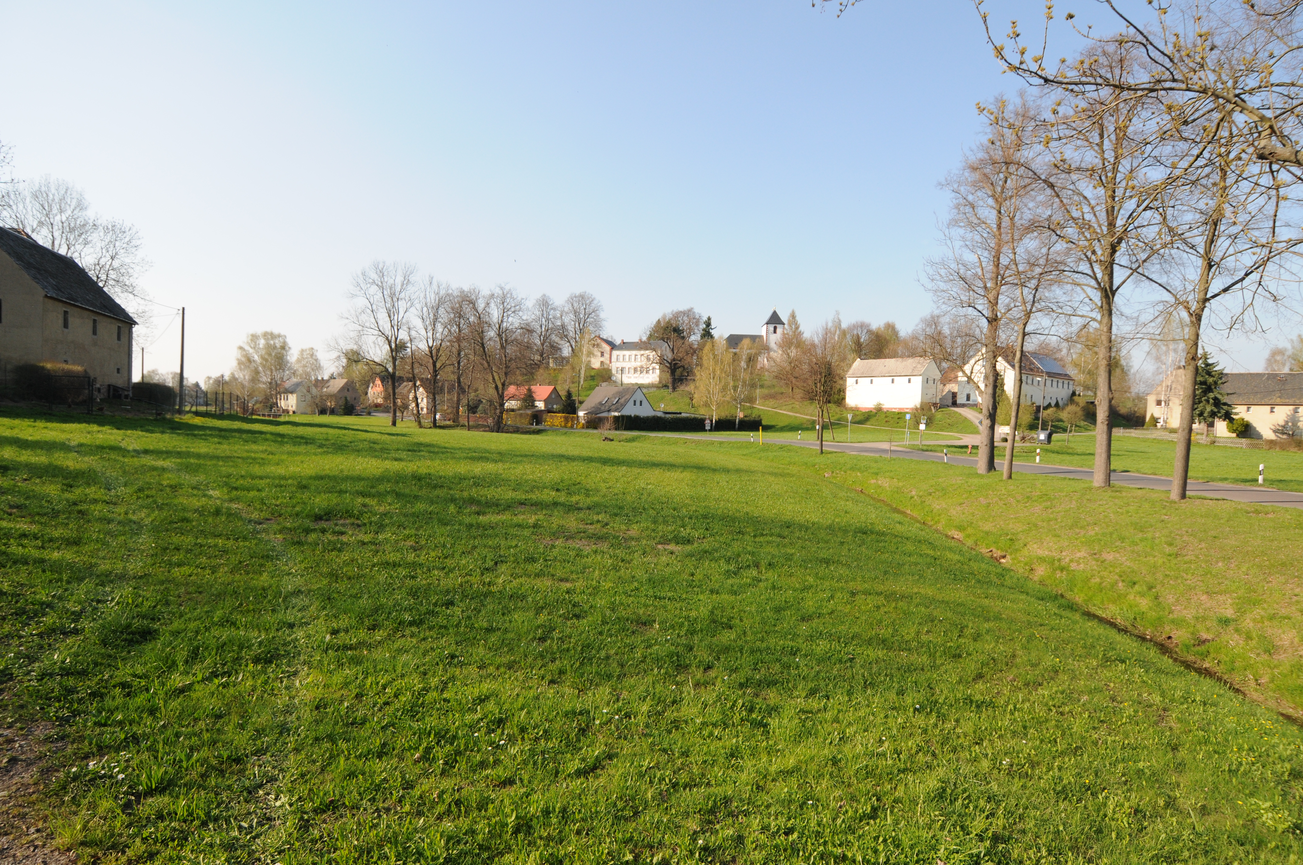 Rathendorf (Gemeinde Narsdorf), Blick zur Kirche (Sachsen, Deutschland)